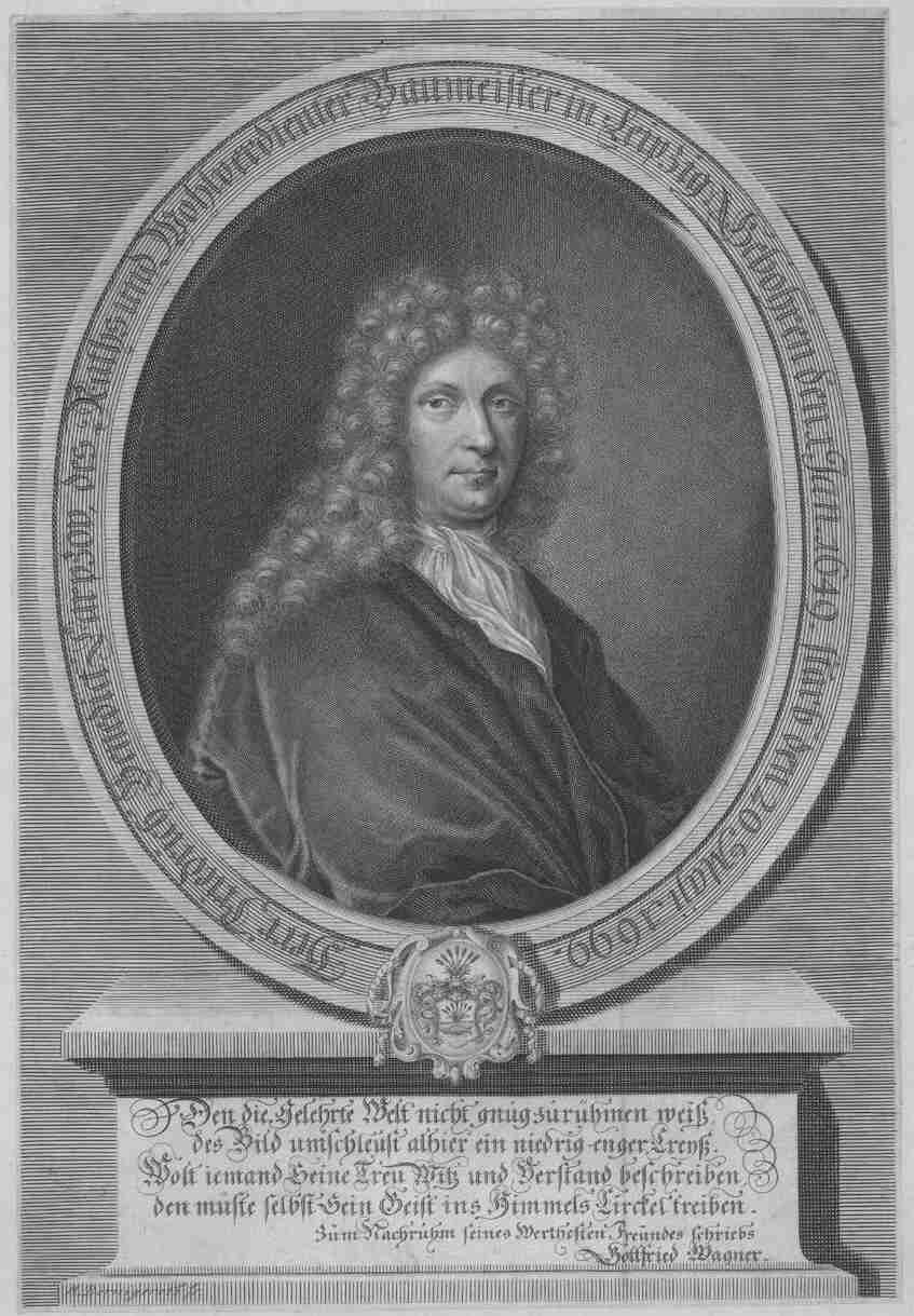 Carpzov, Friedrich Benedict (1649-1699) Polyhistor, Senator, Ratsbauherr; Leipzig Kupferstich / Bernigeroth, M[artin] ; o. J. Bild: 336x230 mm